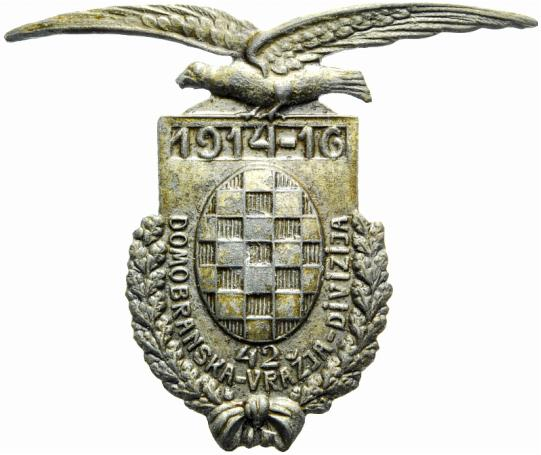 Značka 42. domobranske pješačke divizije